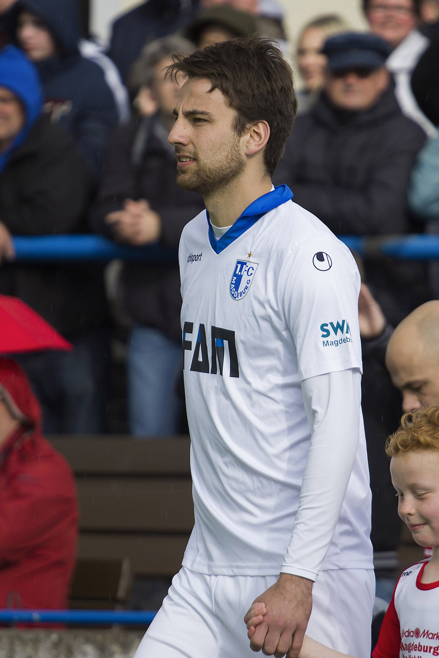 Christian Beck 2016